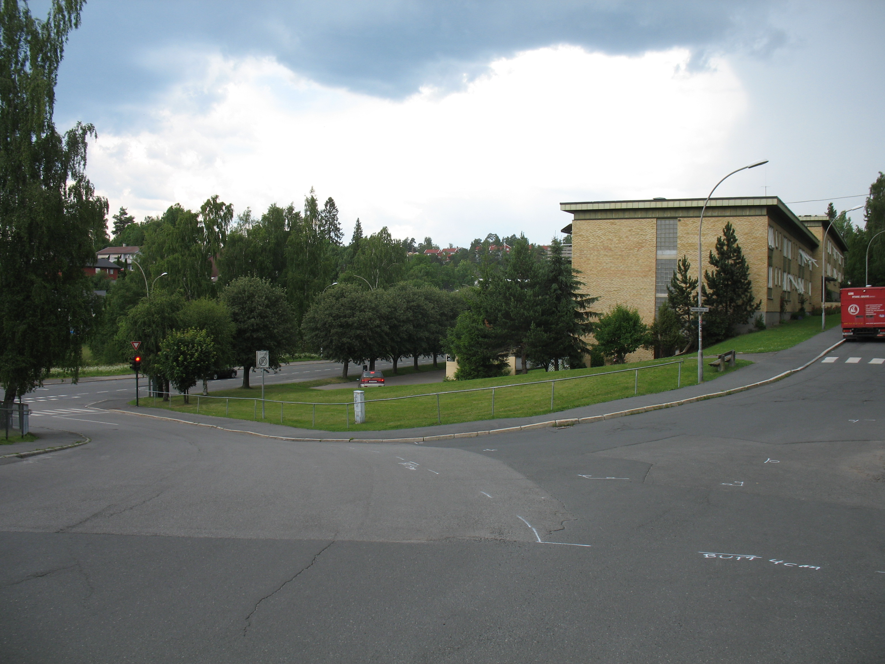 Krysset Mikkel Revs vei og Olav Nygards veg, i bakgrunnen General Ruges vei. Boligblokka er Mikkel Revs vei 2.